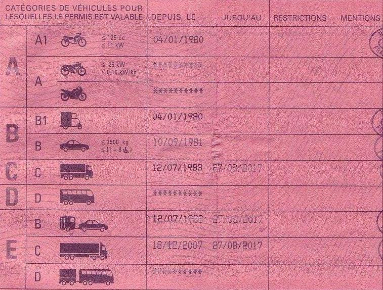 Deuxième et troisième tiers d'un permis de conduire français -version 2012. Le premier tiers et la colonne "timbre" sont volontairement omises.